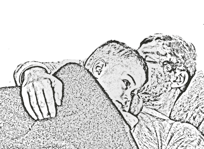 Zeichnung Schlafen von E. Ersch Friedrichsthal-Saar